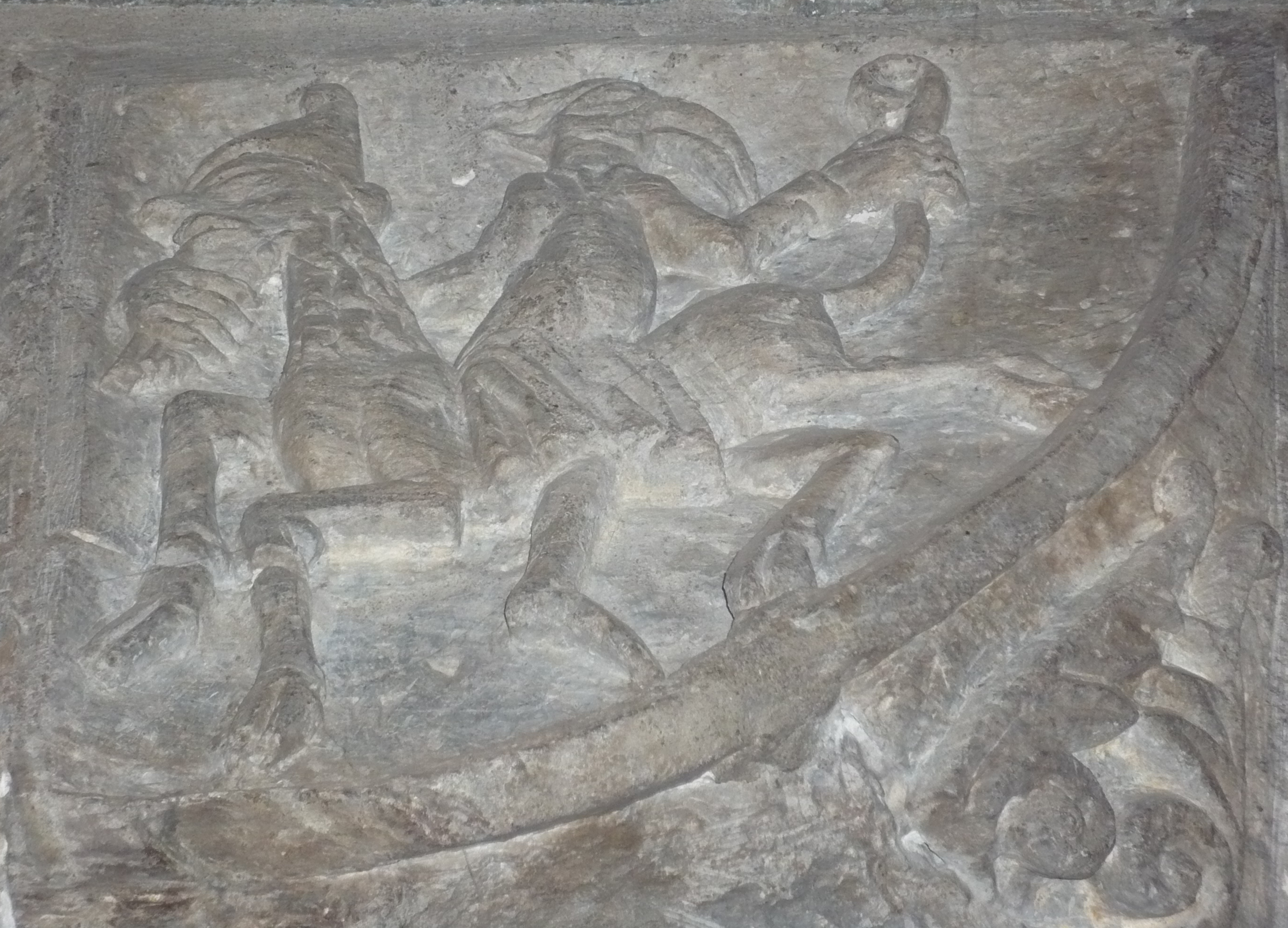 Kentaur i Stavanger domkirke fra ca 1120.